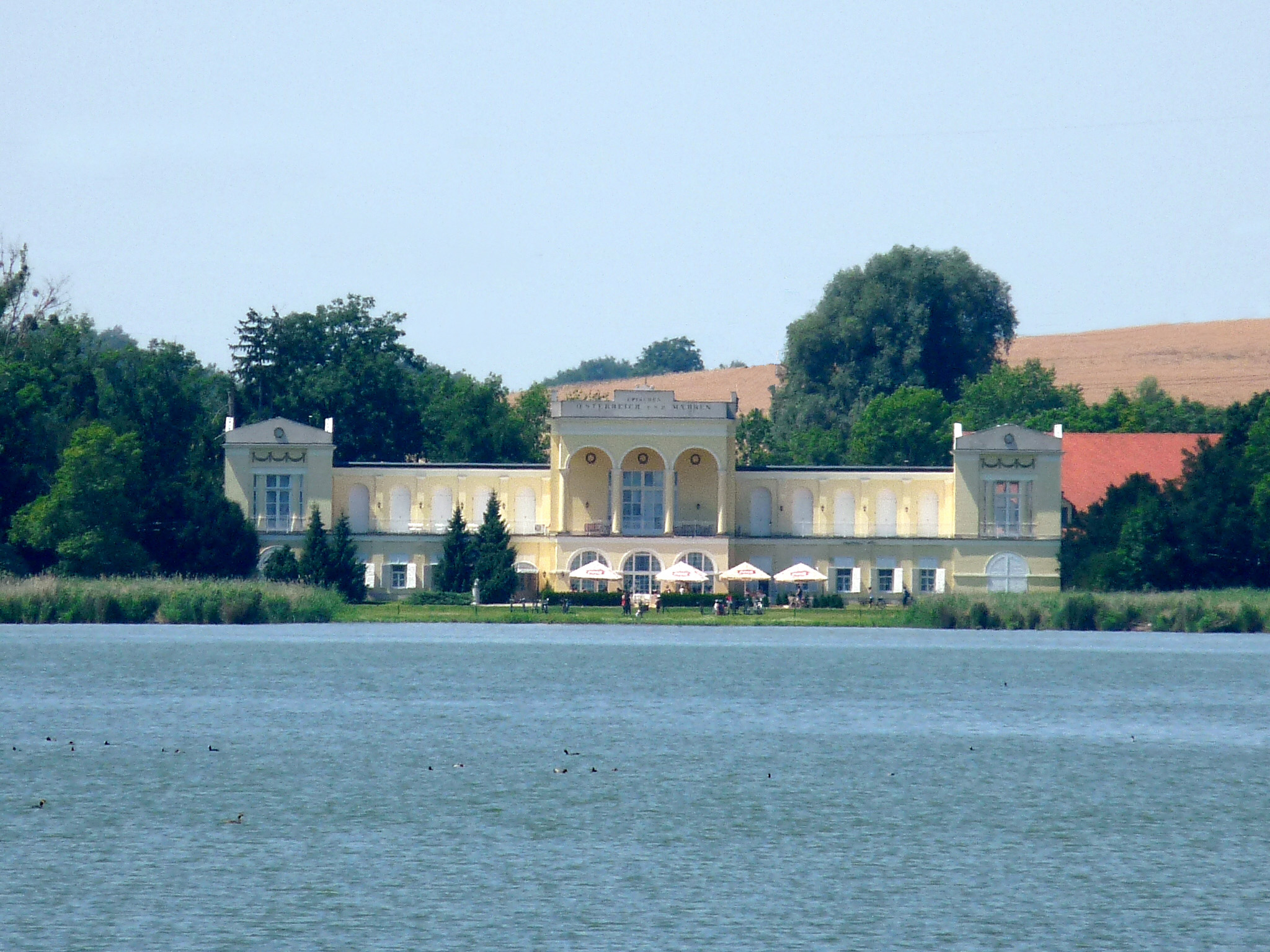 Border Castle Hraniční zámeček u Hlohovce